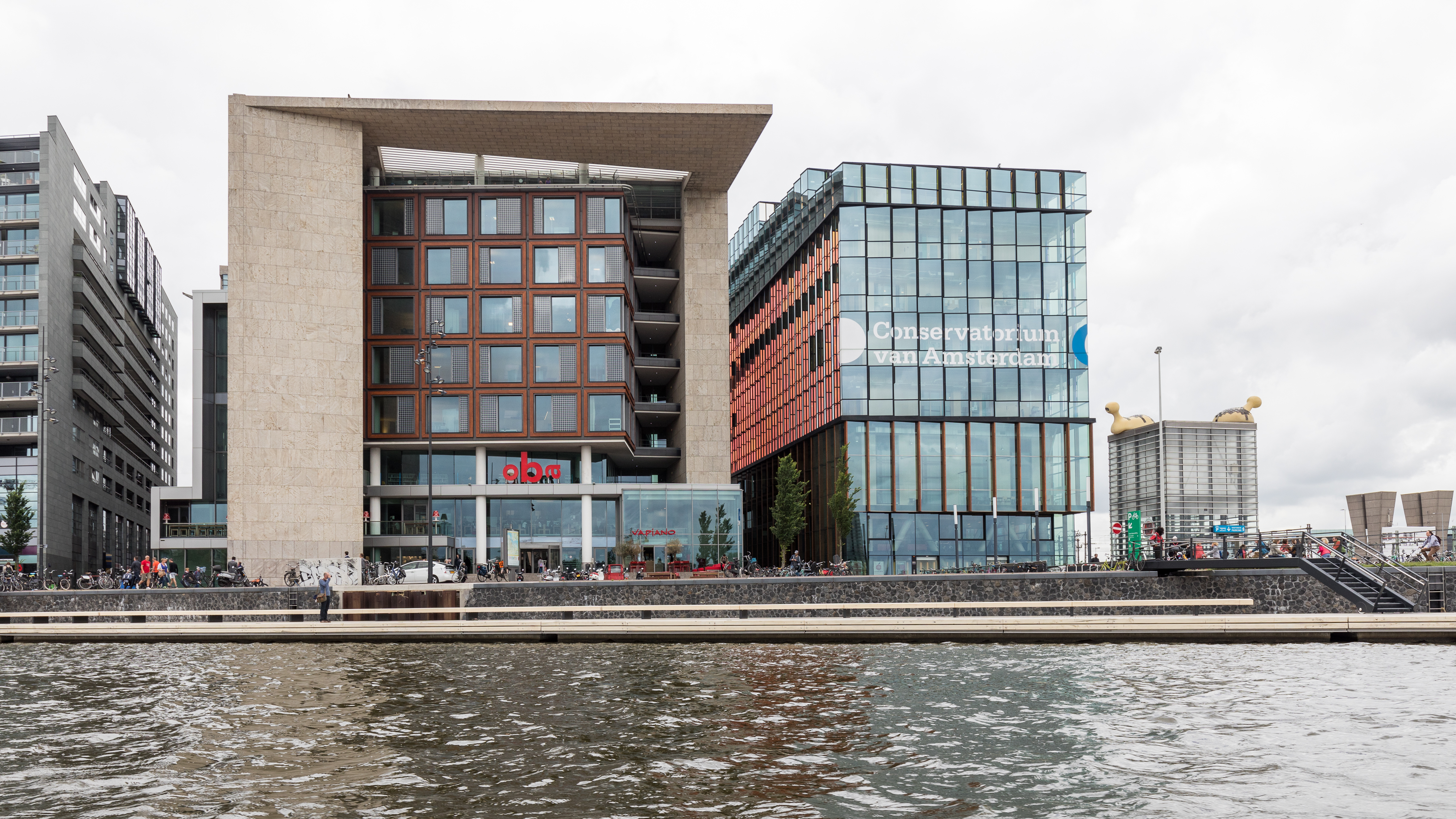 Öffentliche Bibliothek und Konservatorium Amsterdam